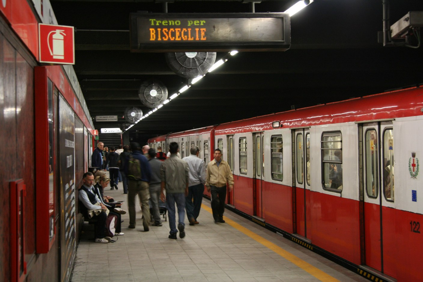 Fermata Loreto della linea 1 della metropolitana di Milano. In sosta un treno comprendente la motrice 122, appartenente al primo lotto.